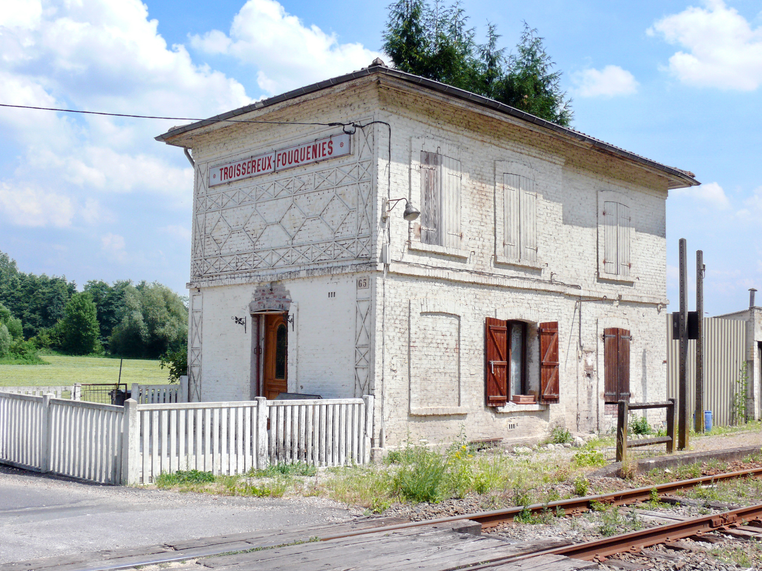 La gare de Troissereux-Fouquenies (La gare est désormais fermée, et les trains ne la desservent plus)